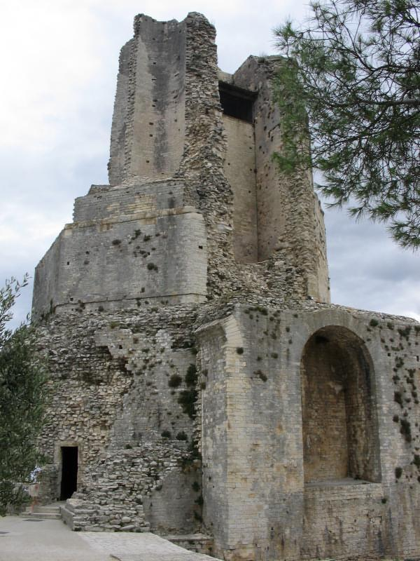 Nimes (France), Tour Magne